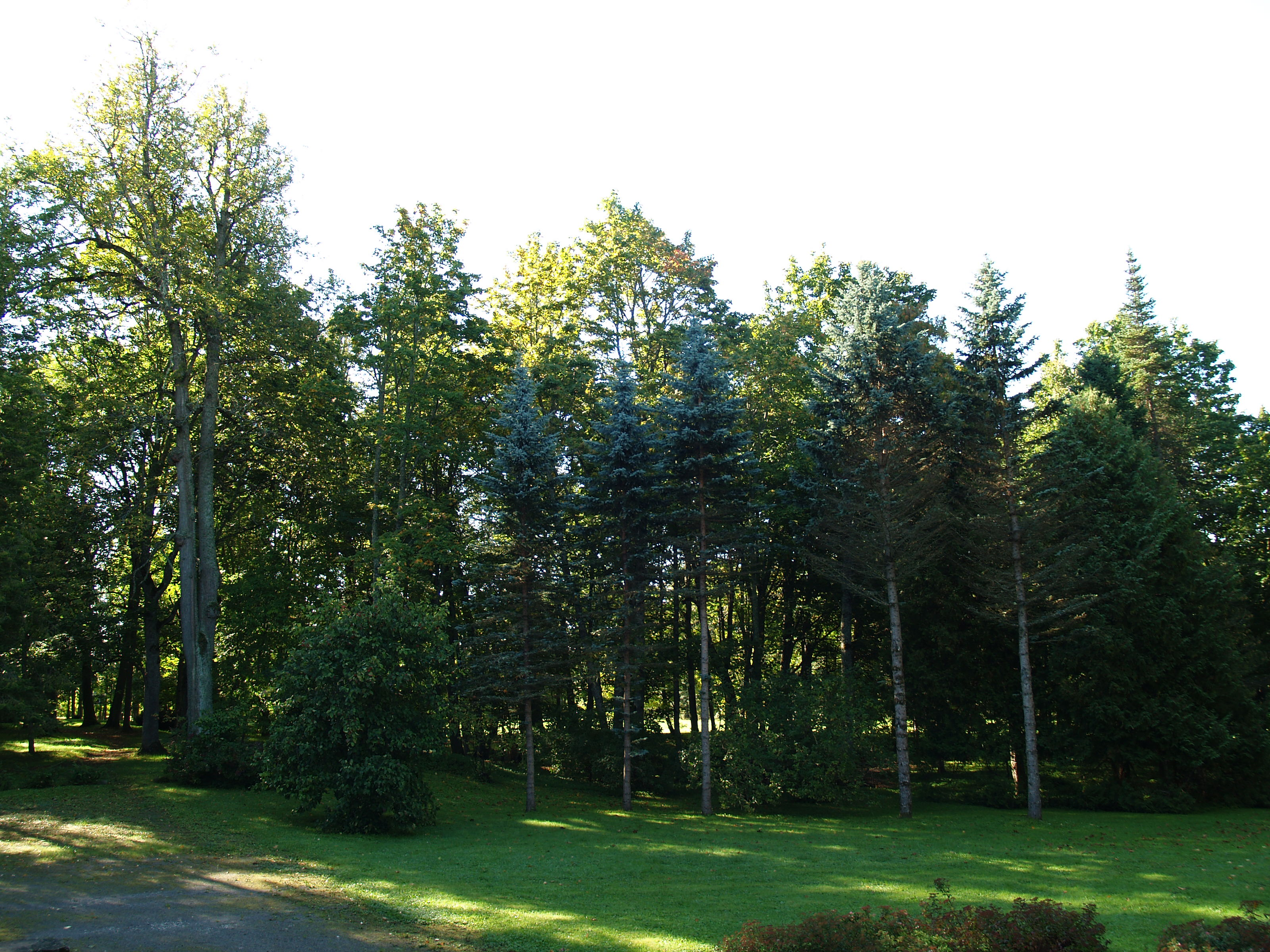 Vana-Kuuste mõisapark